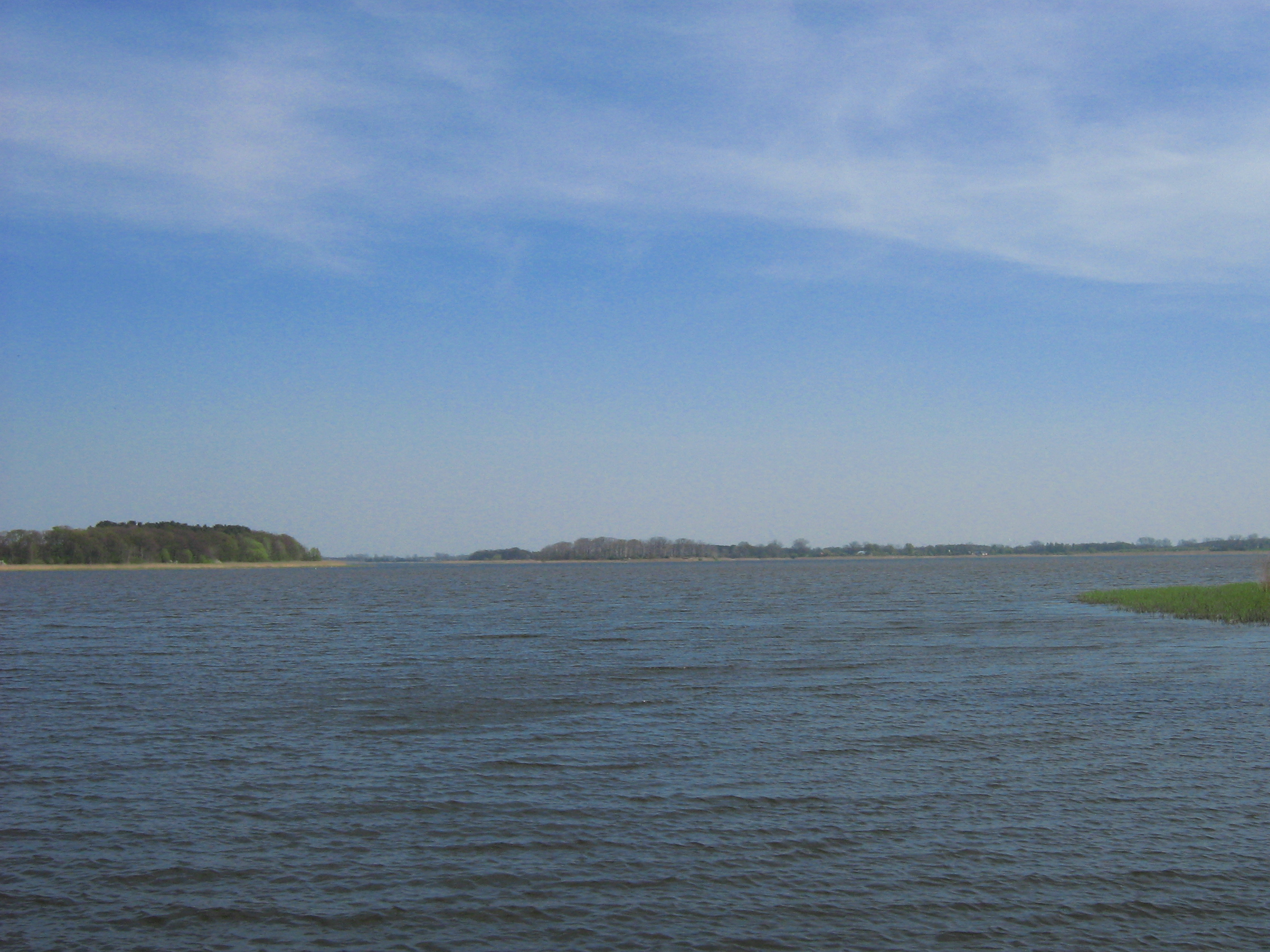 Dziwna widziana z Sierosławia